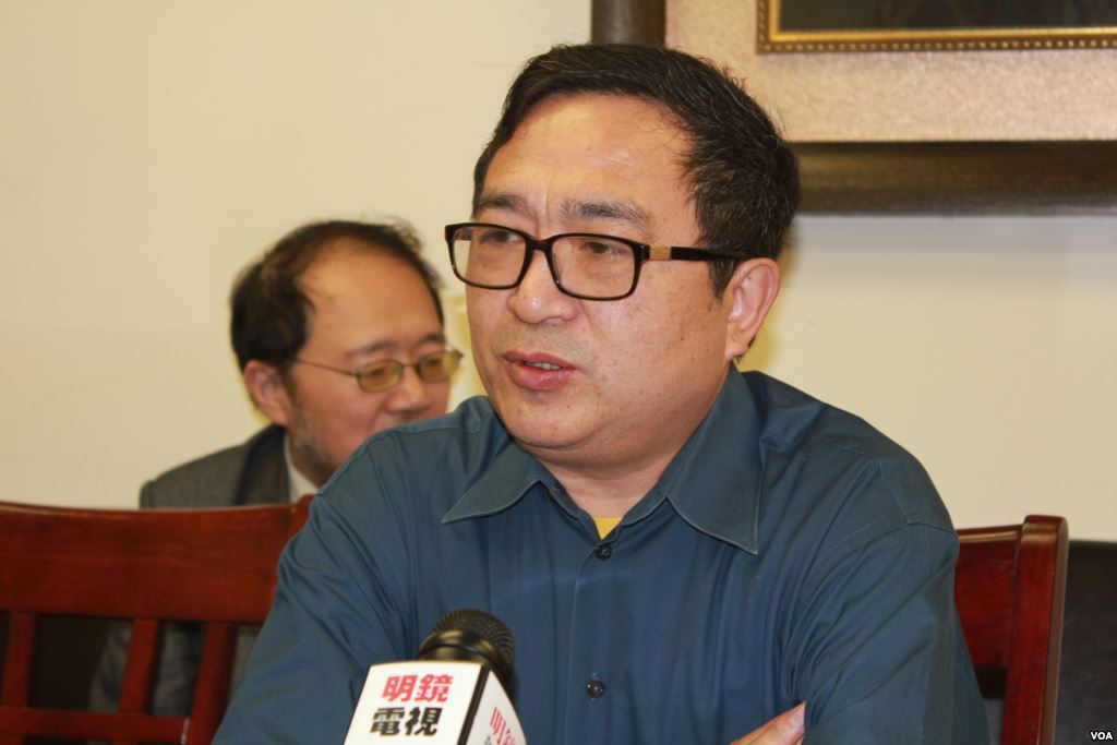 明鏡新聞出版集團總裁何頻出席紀念胡耀邦誕辰100周年討論會。